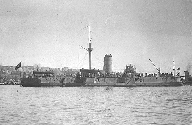 Küstenpanzerschiff Avnillah der Osmanischen Marine